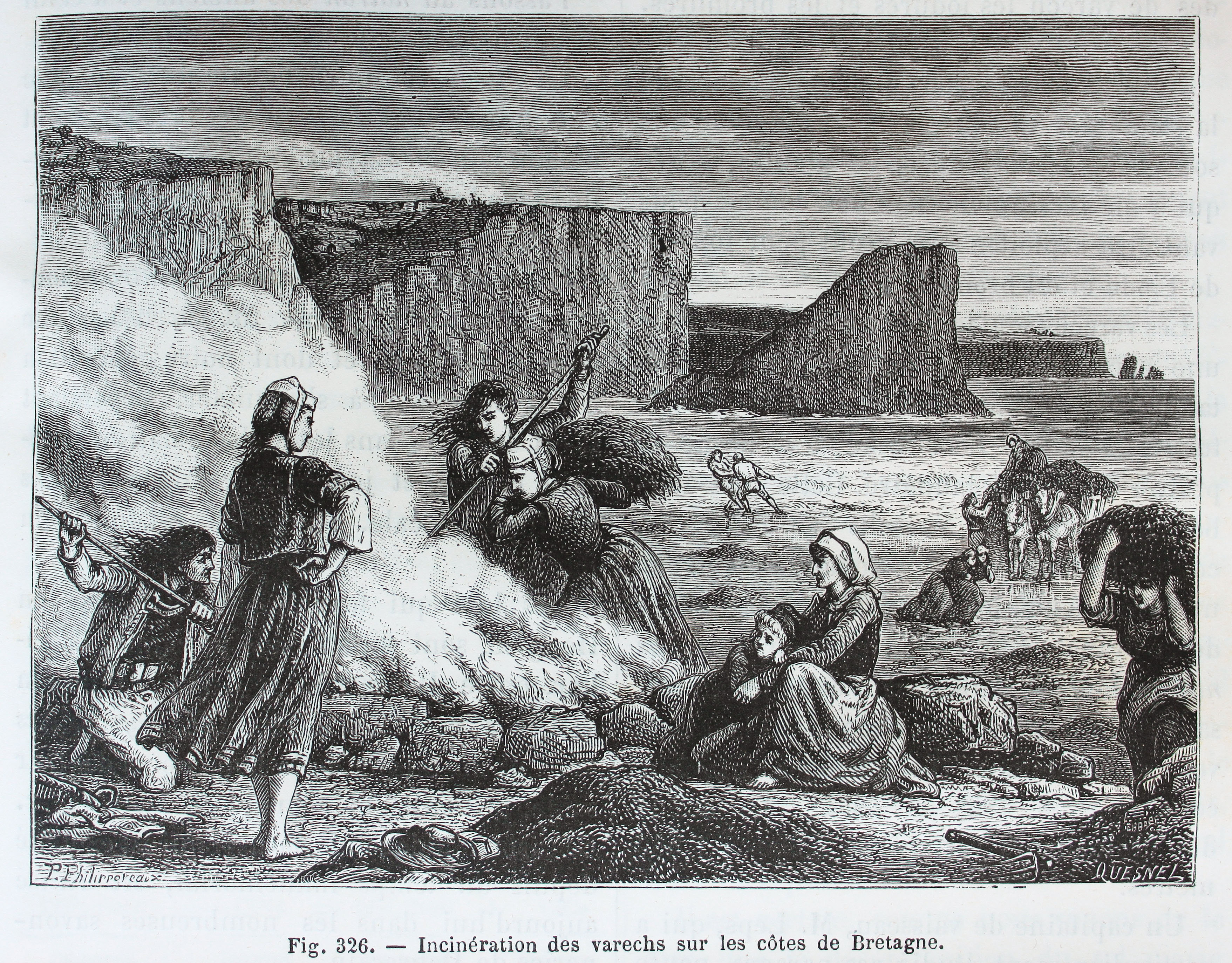 "Incinération des varechs sur les côtes de Bretagne". Ilustraciones de la obra : Les merveilles de l'industrie ou, Description des principales industries modernes / par Louis Figuier. - Paris : Furne, Jouvet, [1873-1877]. - Tome I